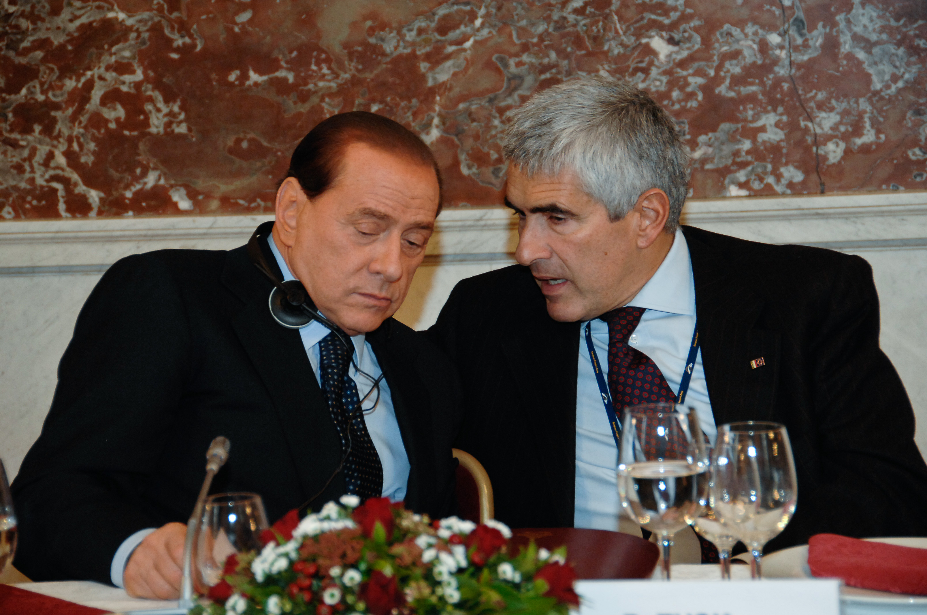 EPP Summit 11 December 2008